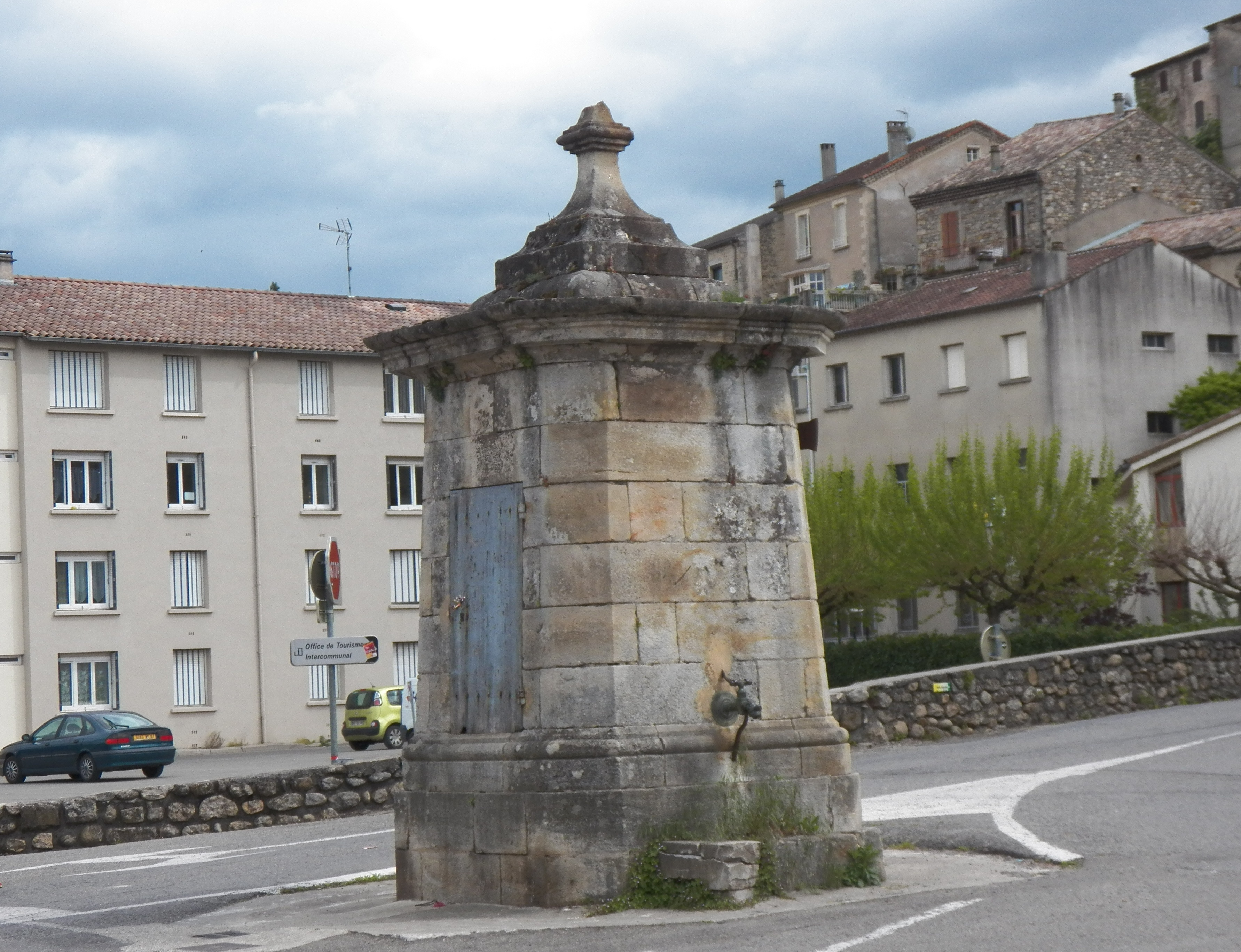 Fontaine place de la Grand Font XVIème ou XVIIème siècle.